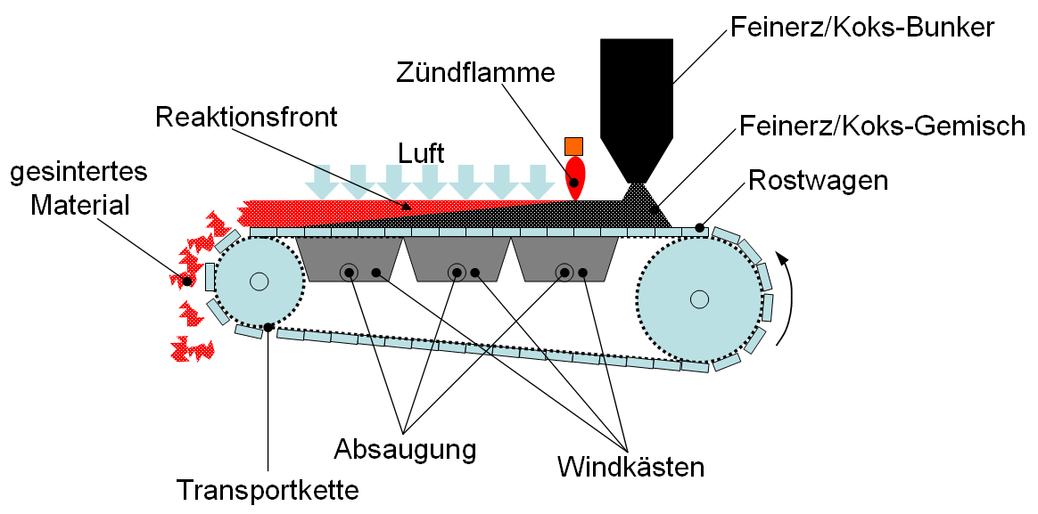 Schema des Dwight-Lloyd-Verfahrens zum Sintern und Vorreduzieren von feinkörnigen Erzen